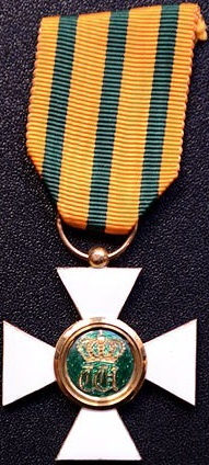 Dem Guido Oppenheim seng Chevalier de l'Ordre de la couronne de chêne-Medail.